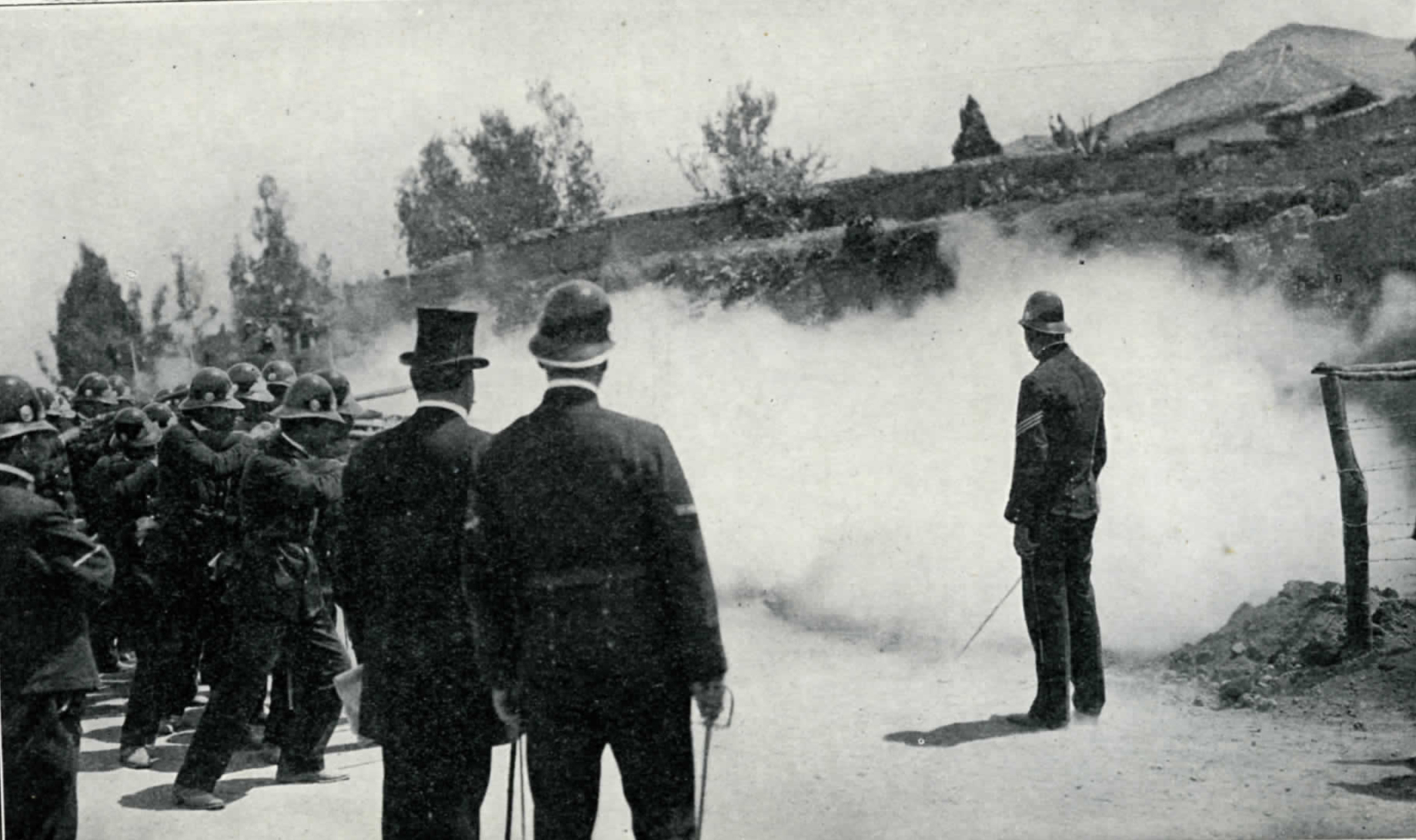 Ejecución de los autores del atentado en contra del presidente Reyes, 1907